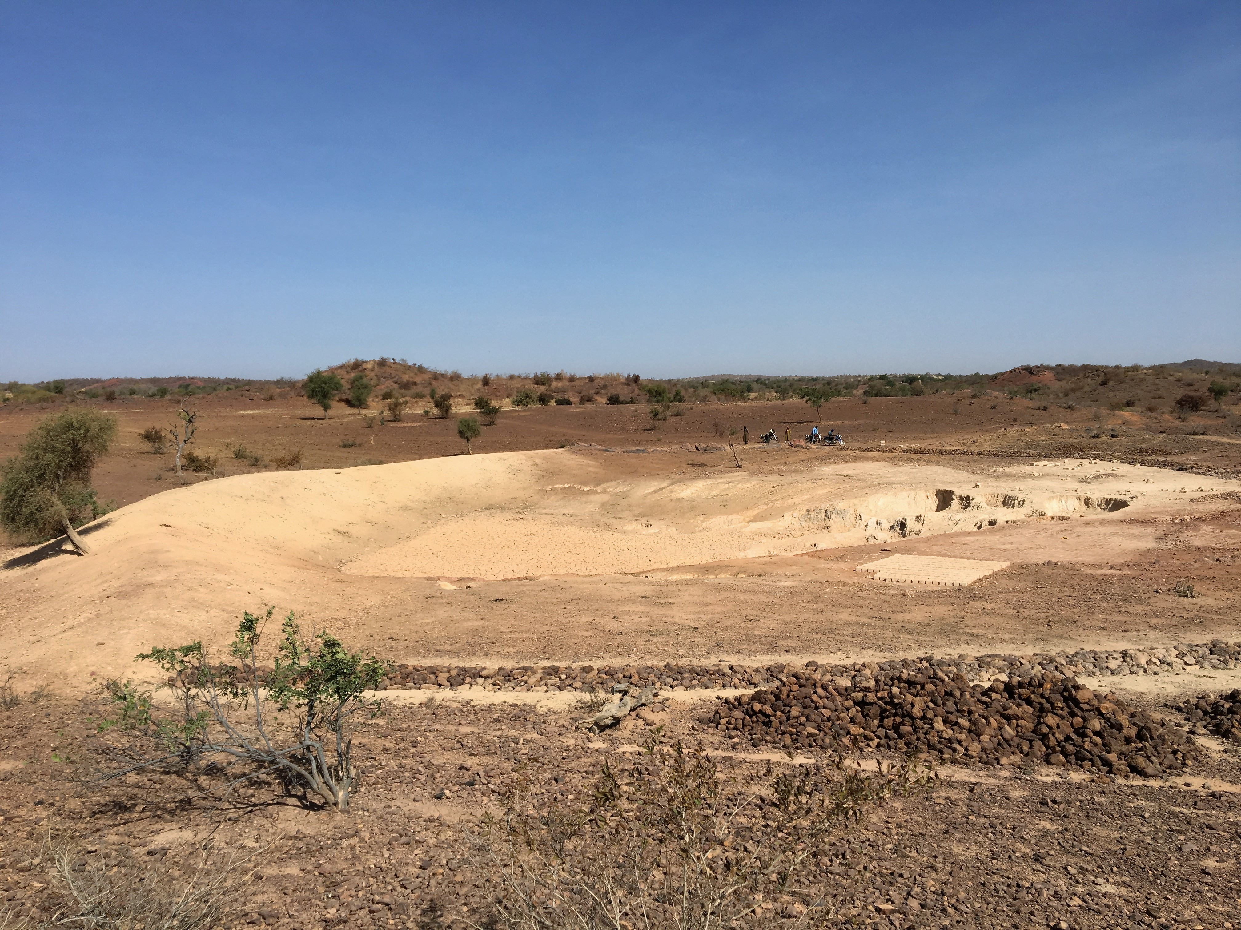 Bouli de Bogonam Peulh